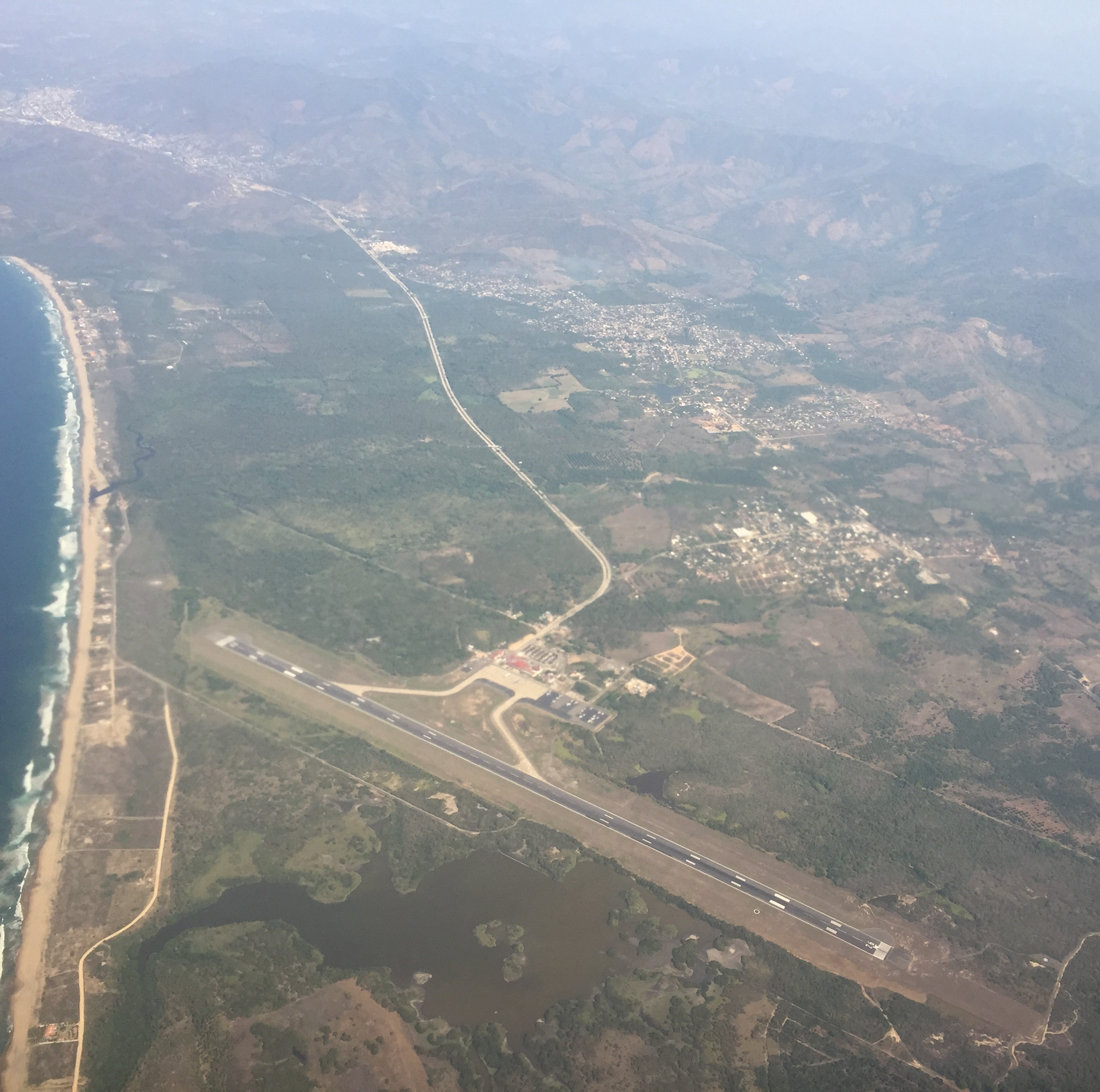 Vista aérea del Aeropuerto de Ixtapa-Zihuatanejo.